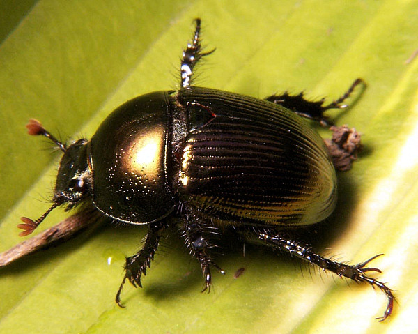 jpeg image, dung beetle in the genus Geotrupes. Size: 20mm